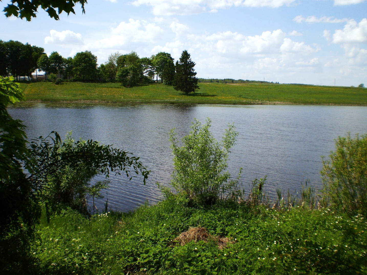 Mantviliškio tvenkinys, ties Pilioniais, Kėdainių raj.